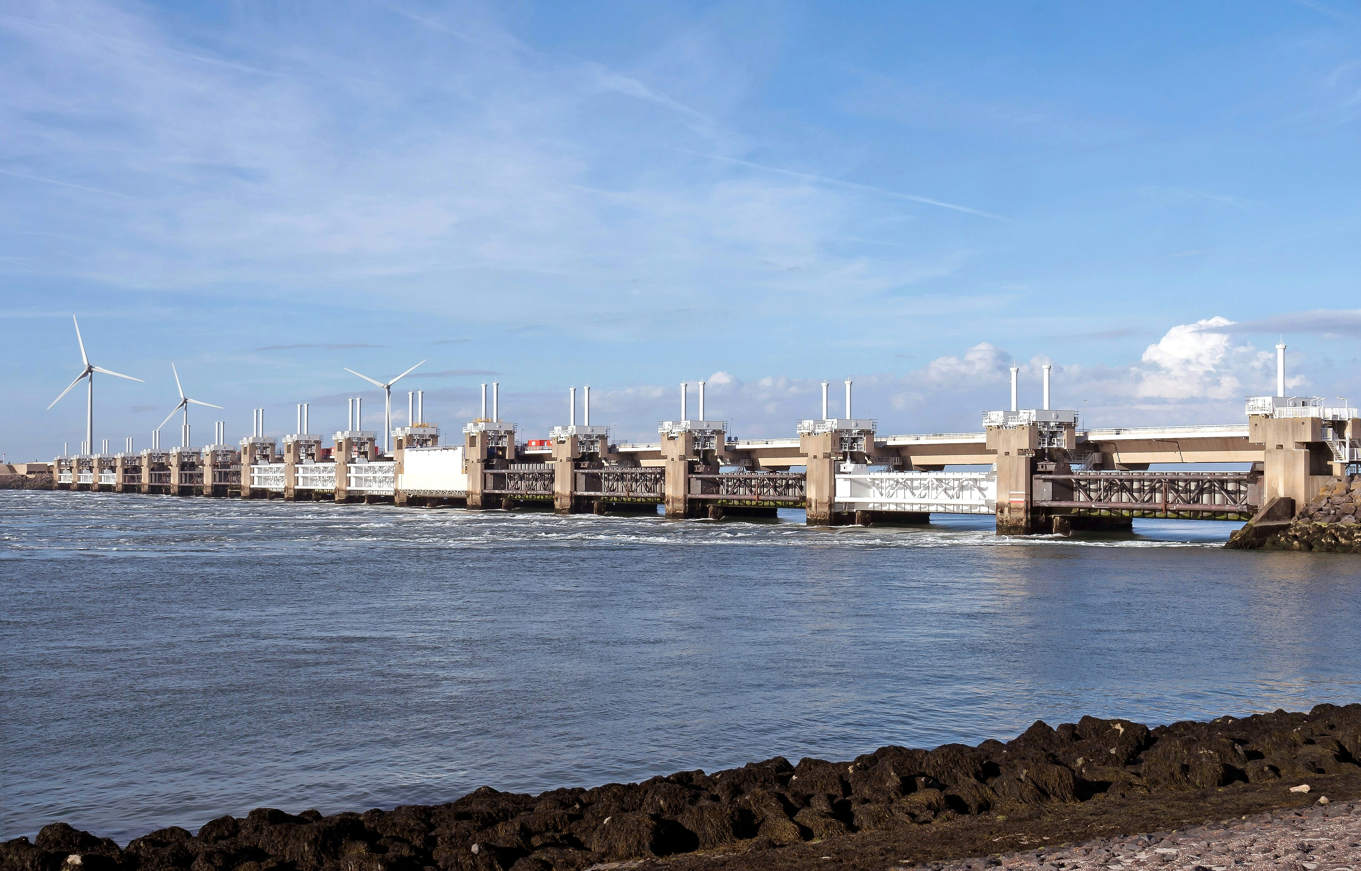 Oosterschelde-Sperrwerk, Seeseite bei Ebbe